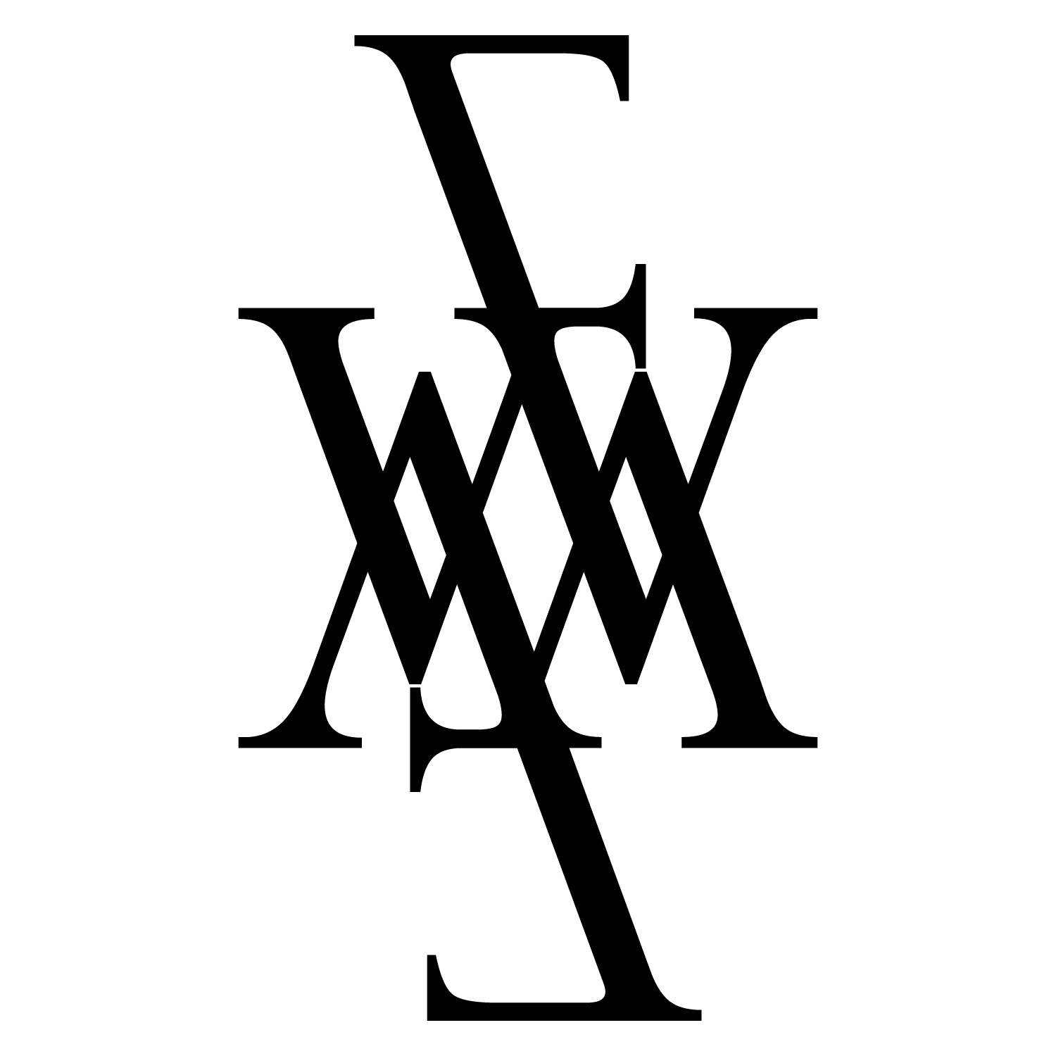 Monogram van Vrijmetselaarsloge Willem Fredrik